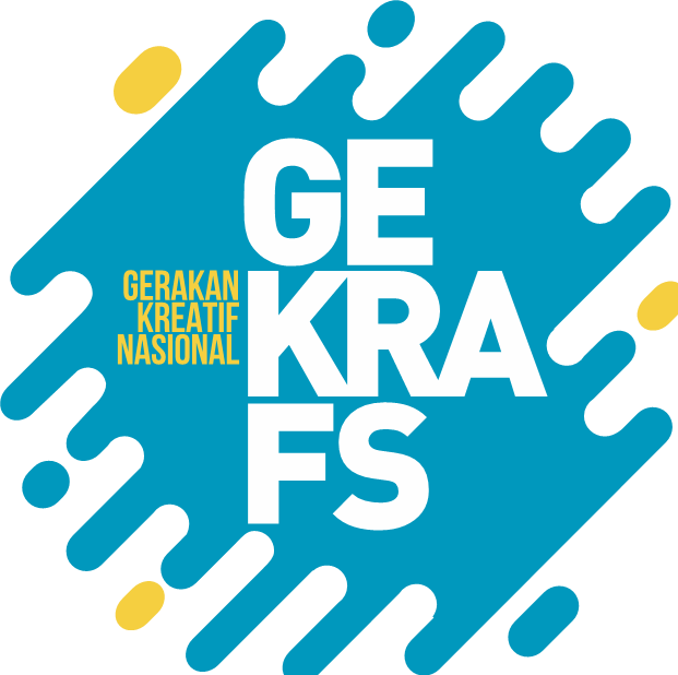 Logo Gerakan Kreatif Nasional (GeKrafs)